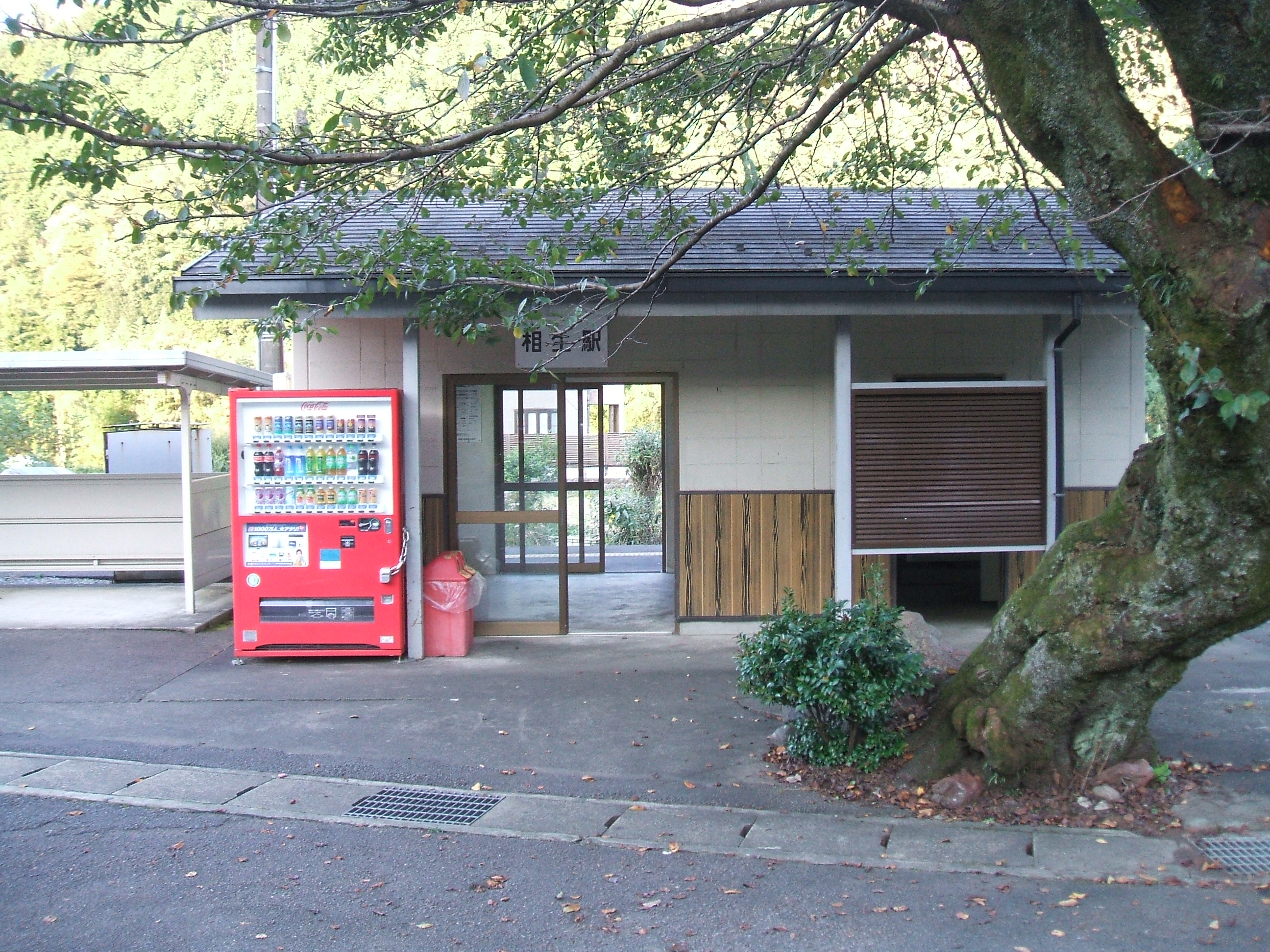 駅舎。